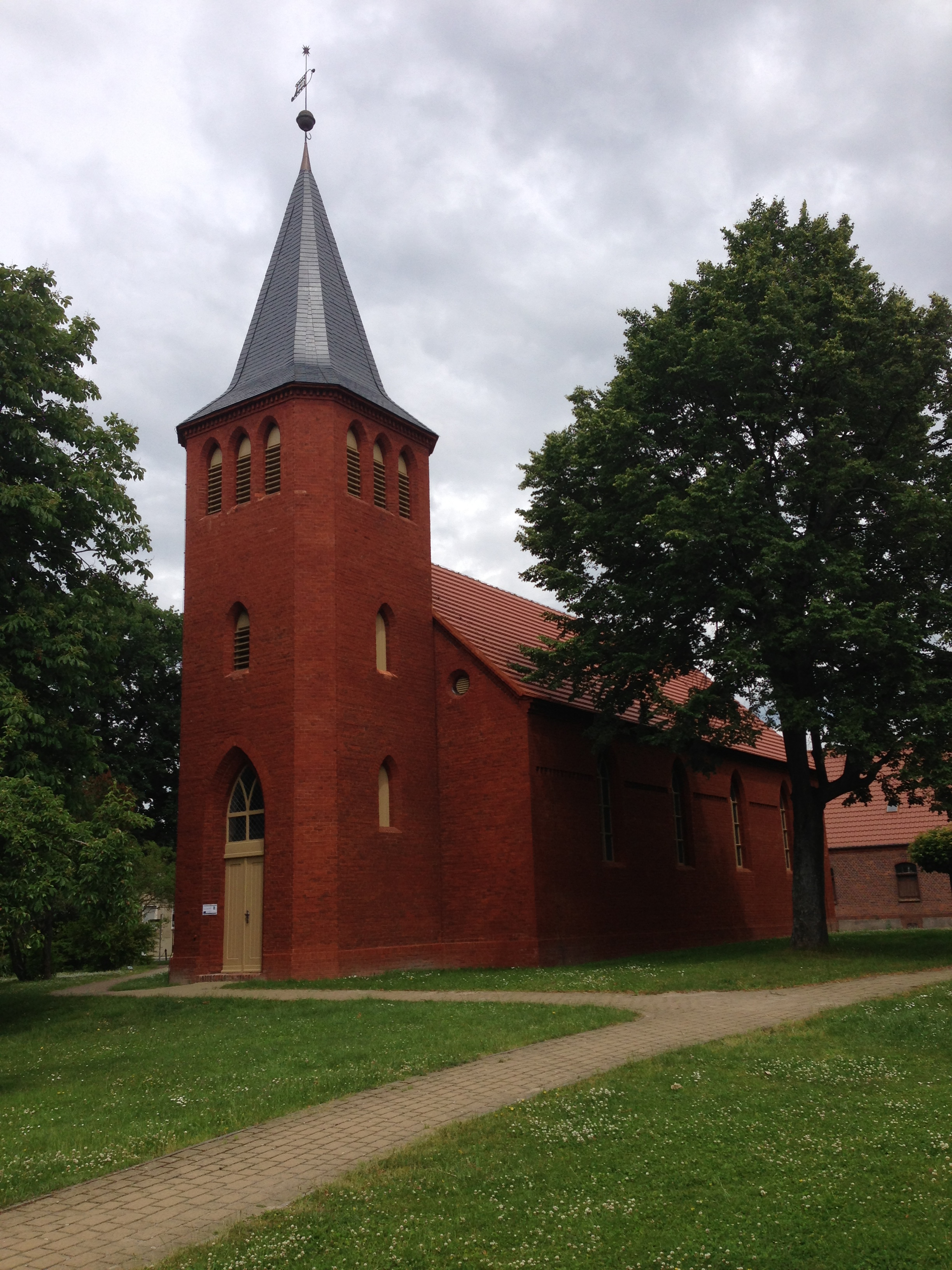 Schinkelkirche in Kleinwusterwitz nach Sanierung von Fassade und Dach 2012, Ansicht von Westen